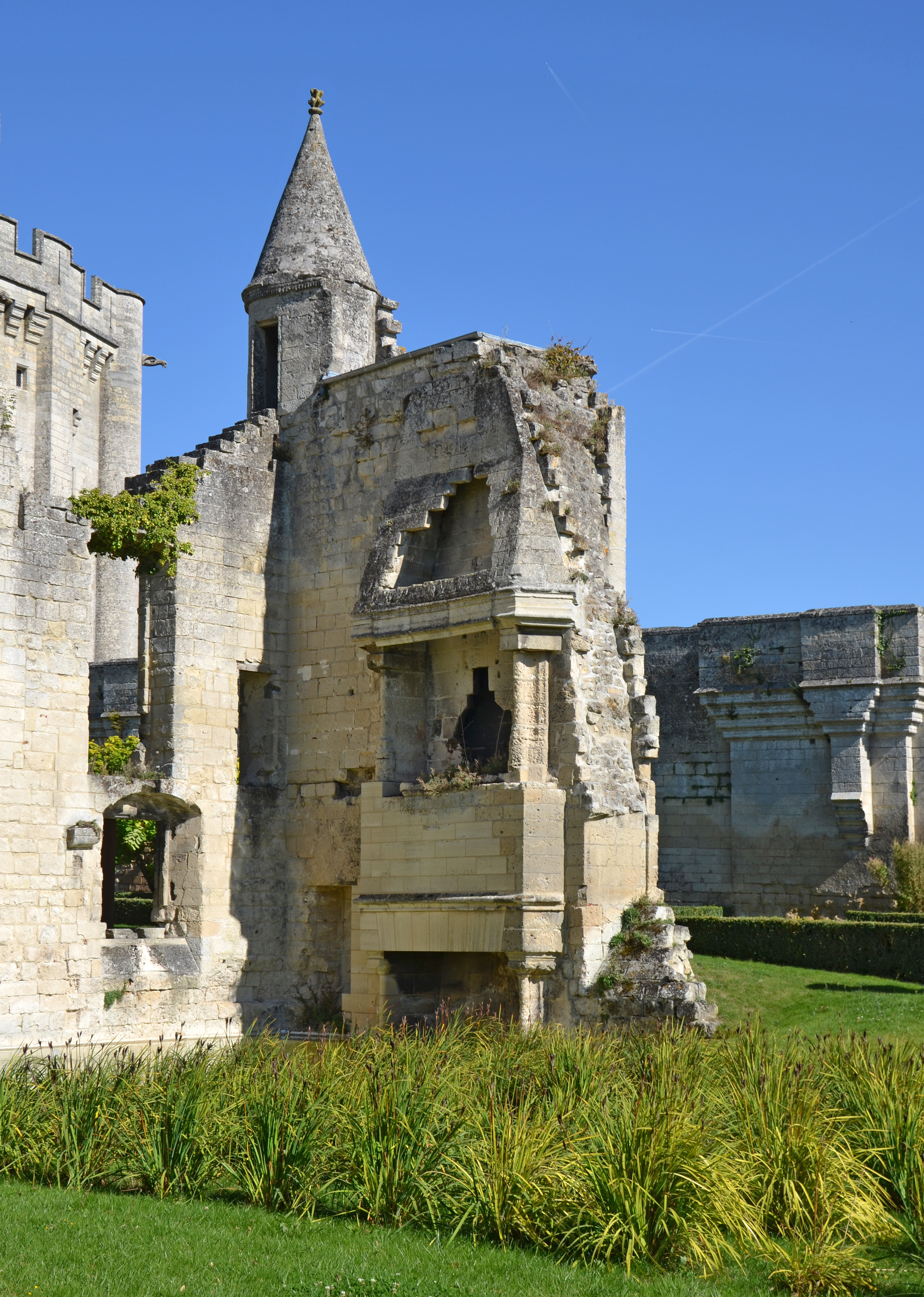 Ancien corps de logis du chateau de Vez, Oise, Picardie, France